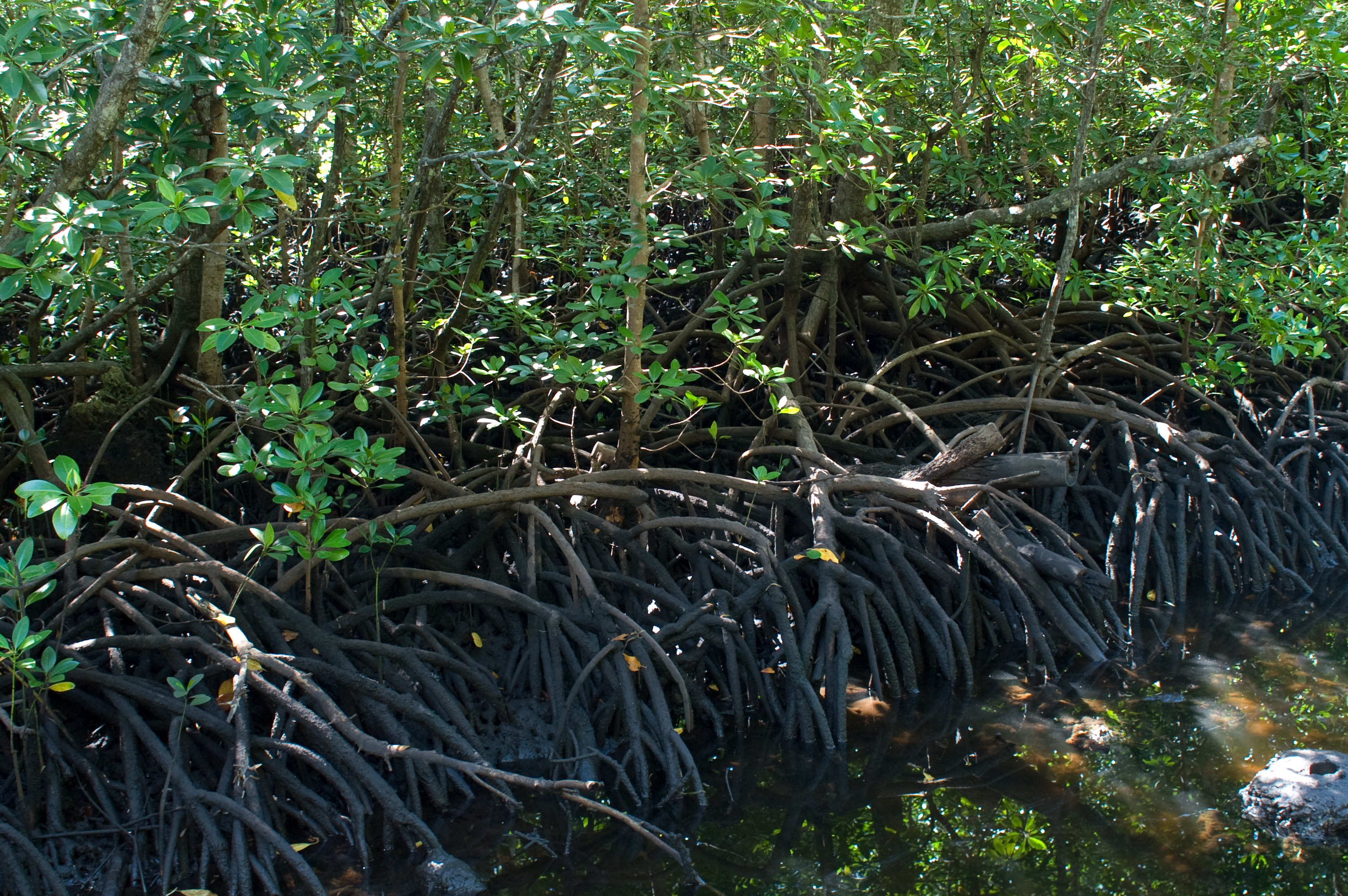 Mangrove in Jozani Forest, Zanzibar.